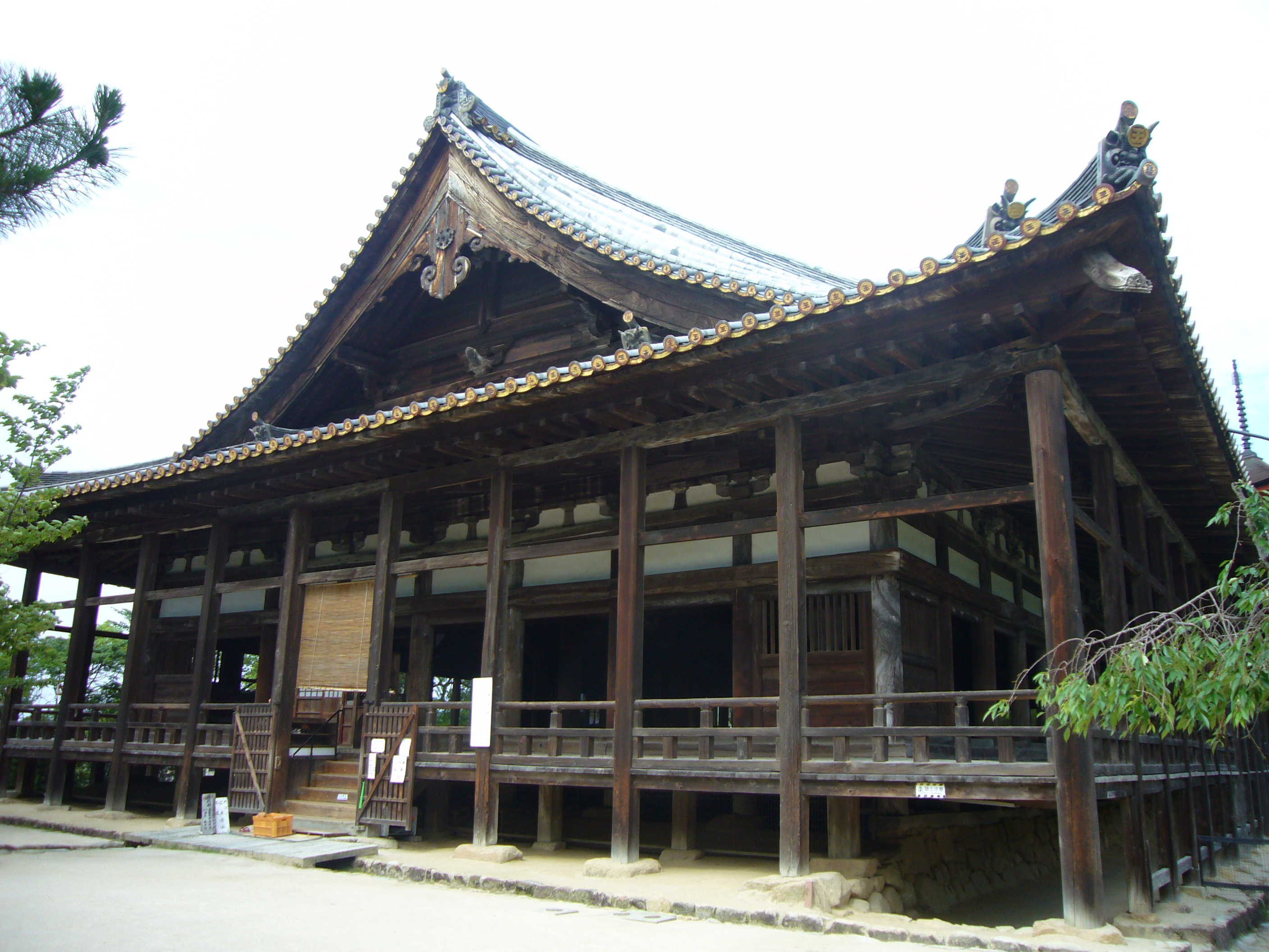 千畳閣を南側より撮影